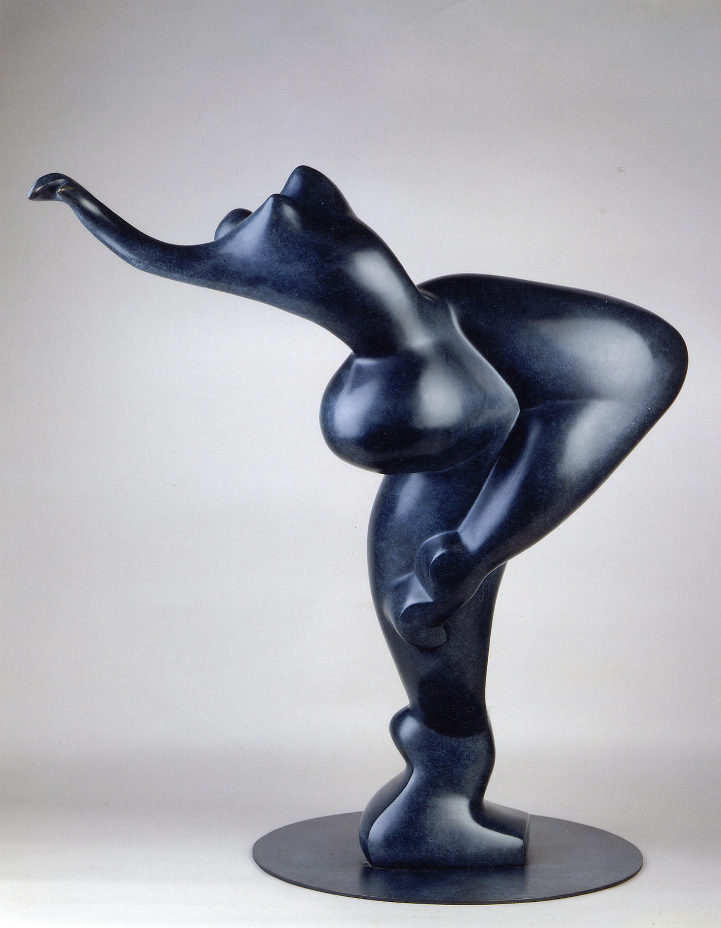 statue bronze